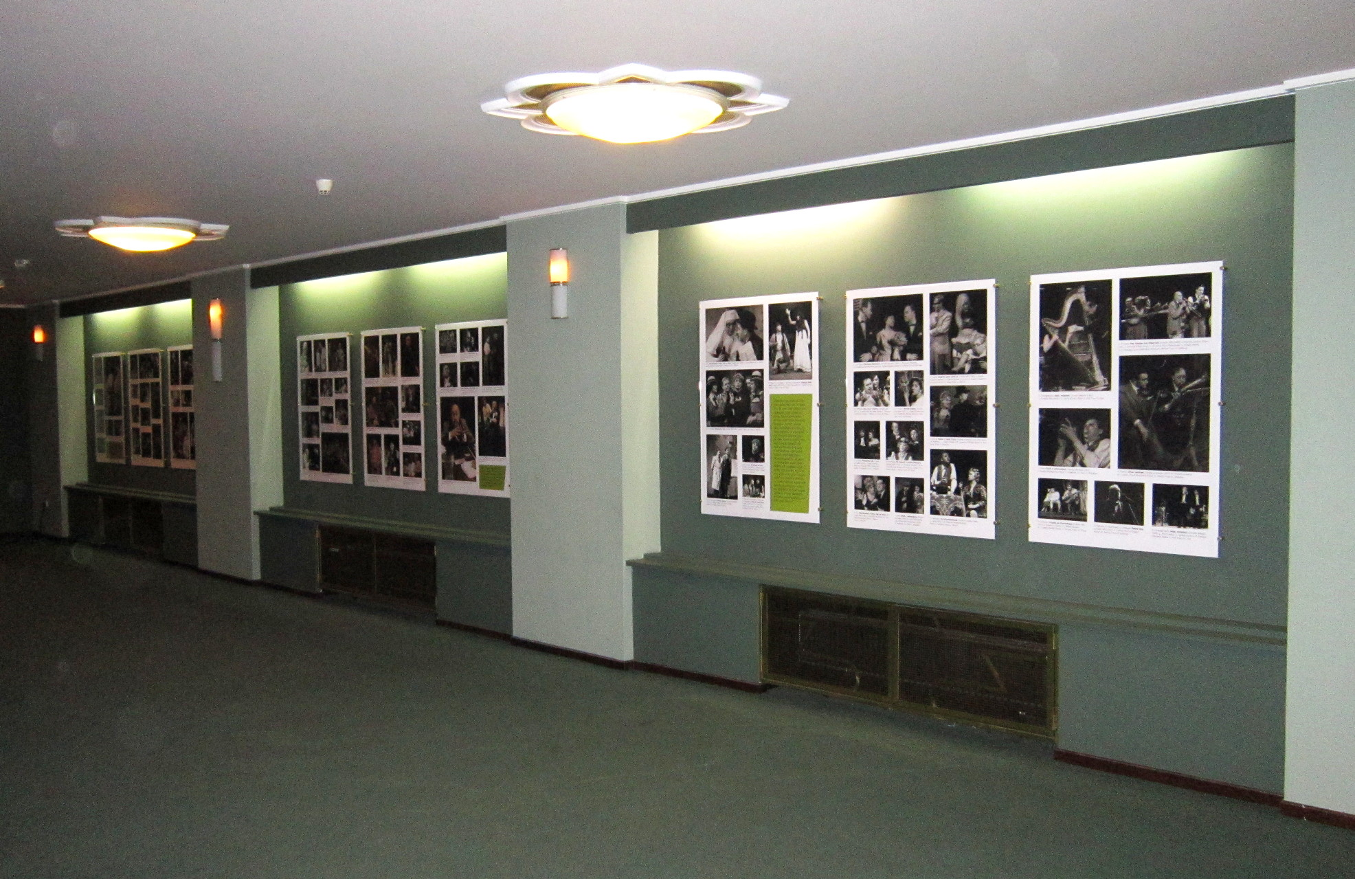 Foyer Divadla ABC s retrospektivní výstavou k 90. narozeninám Lubomíra Lipského.